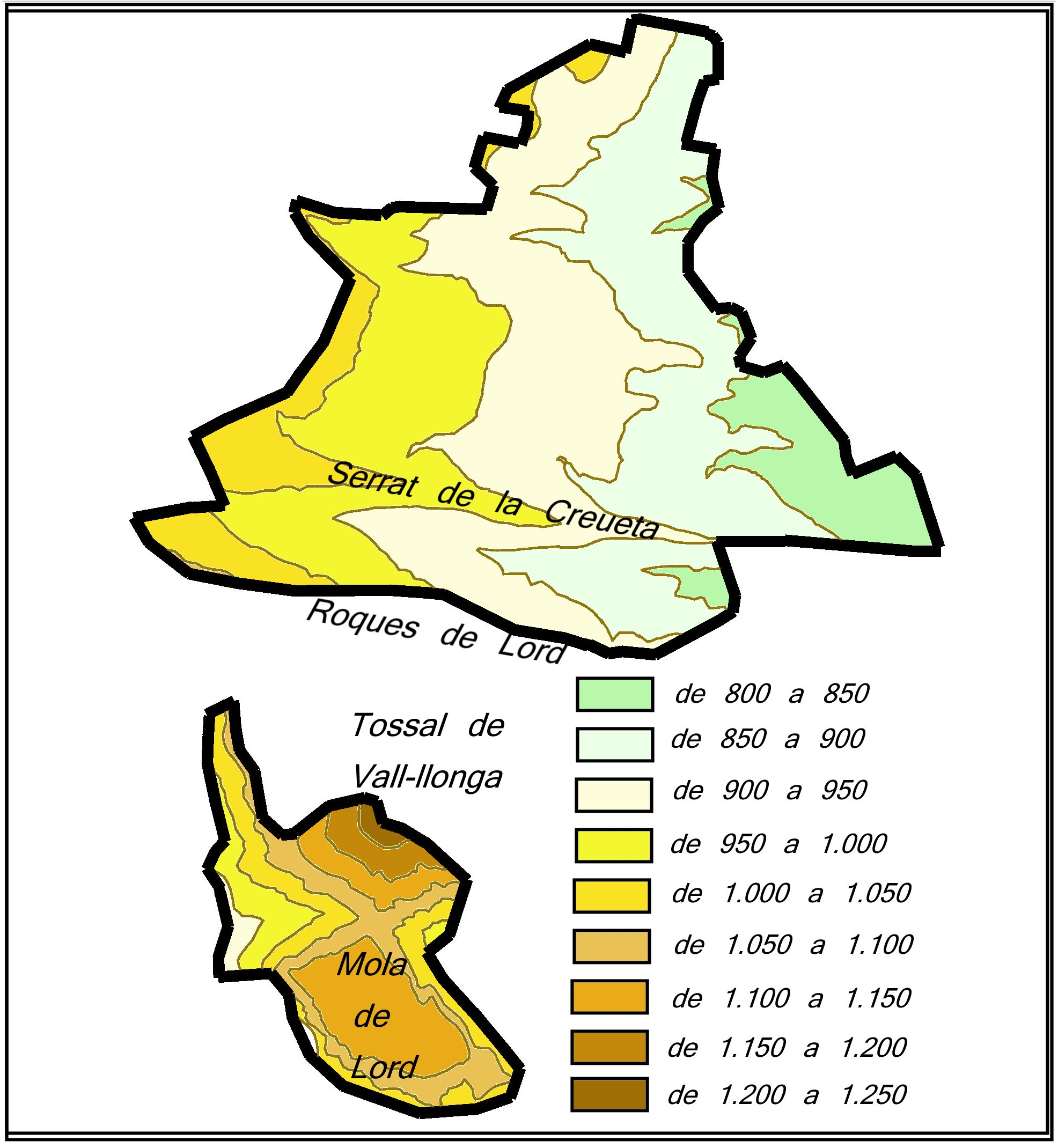 Mapa orogràfic del municipi de Sant Llorenç de Morunys (Solsonès)